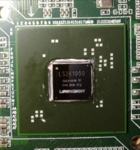 龙芯2K1000芯片正面照